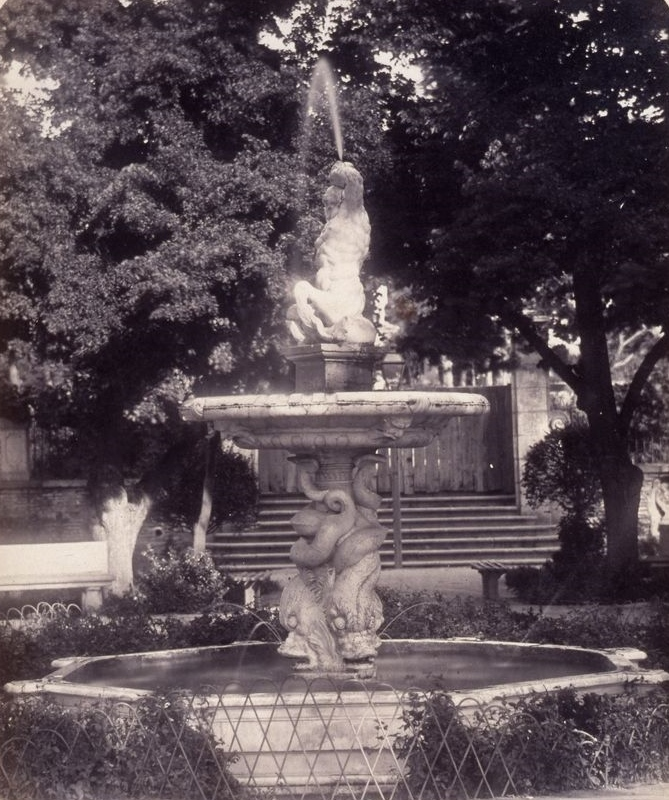 Fuente del Tritón o "de Recoletos" que estuvo en el jardín del conde de Baños en el siglo XVIII, de donde pasó al Jardín de las Delicias y luego al Paseo de Recoletos. Obra en 1864 del fotógrafo toledano Alfonso Begué, muerto el 31 de octubre de 1865. Cartulina sepia. Albúmina. 43 x 32 cm. Fotografía contenida en un álbum procedente del Archivo de Villa y trasladado al Museo de Historia en 1983.